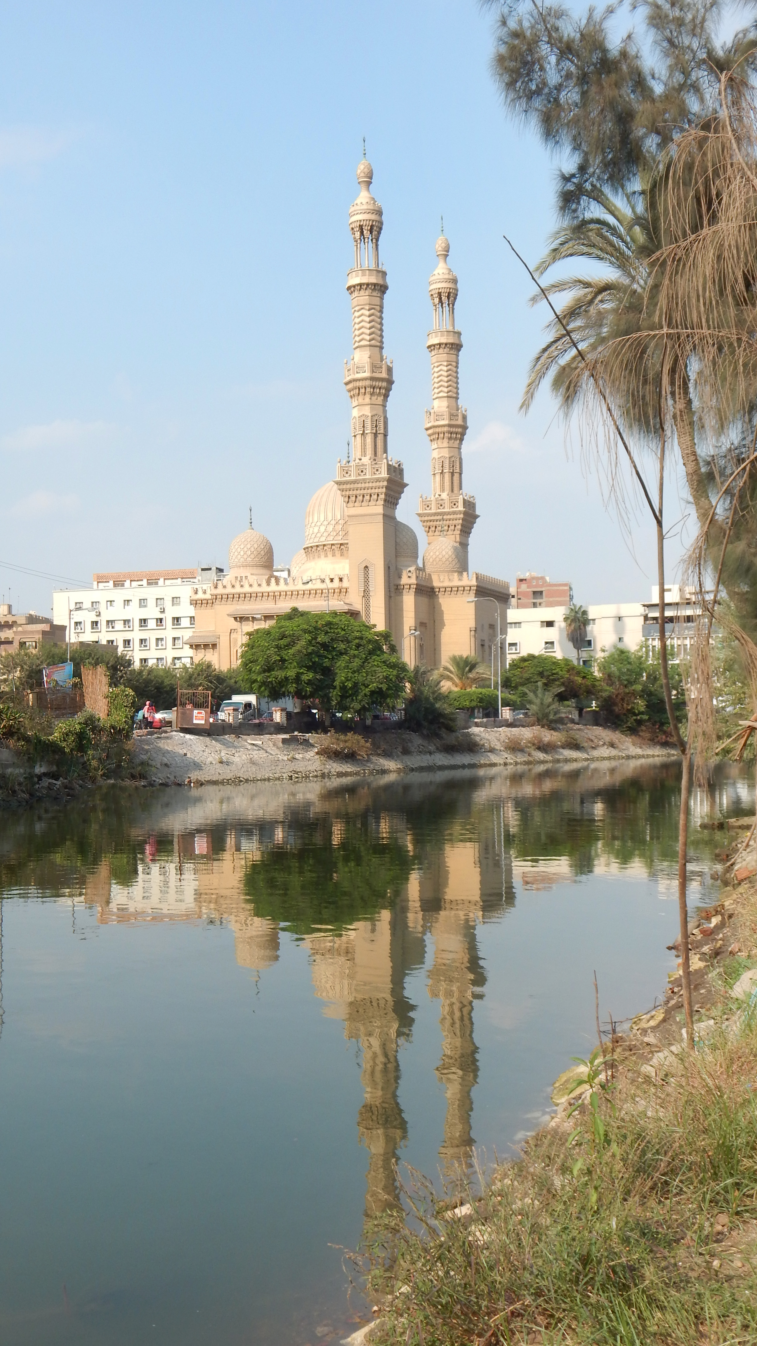 مسجد الفتح بالزقازيق - صورة من على الجسر السفلي المقابل للمسجد على بحر مويس